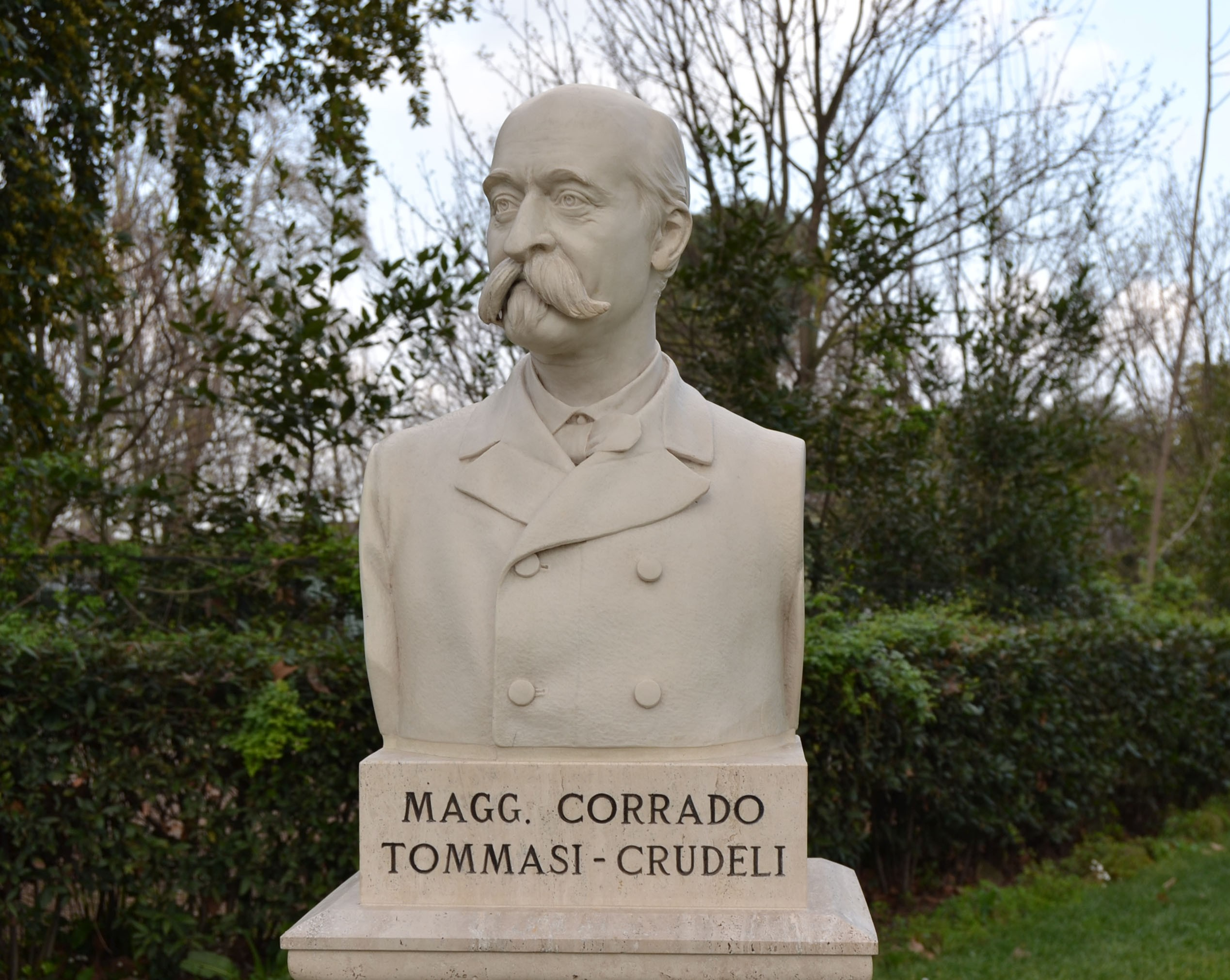 Busto restaurato del Magg. Corrado Tommasi Crudeli